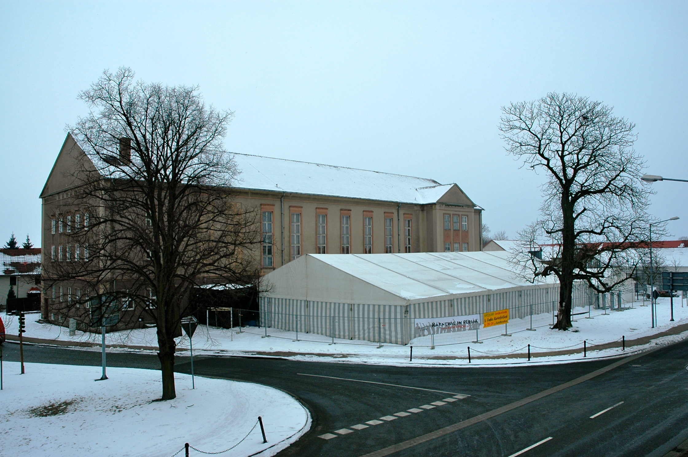 Kulturhaus Plessa (culture house Plessa, pup tent after detent, 2009)